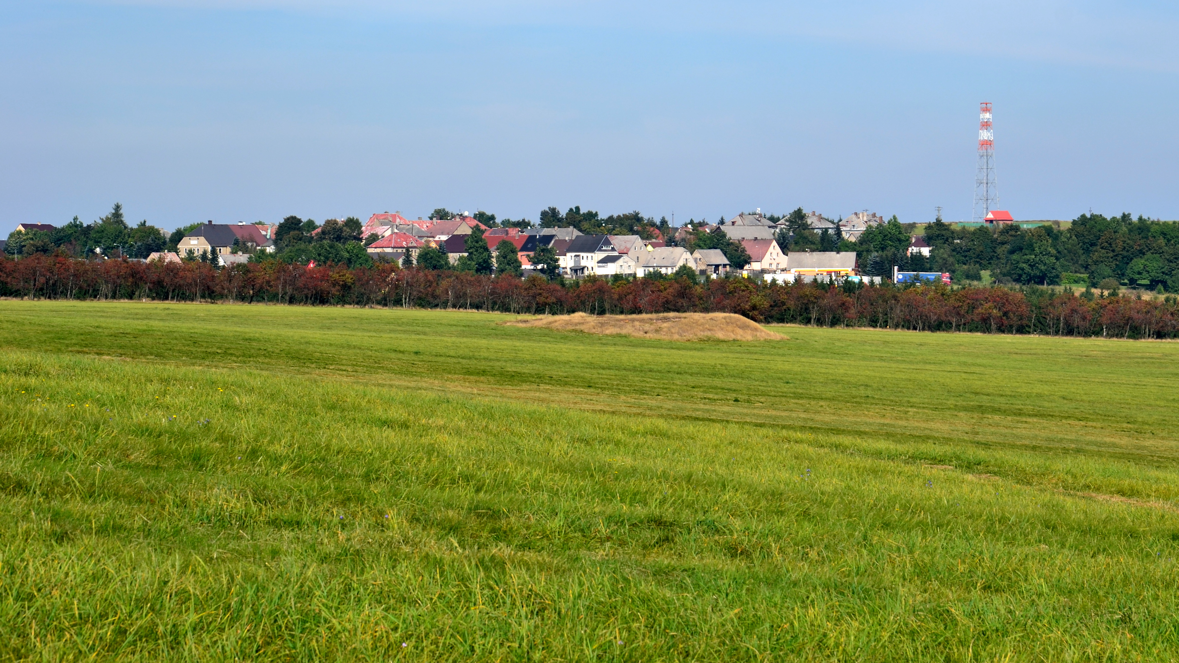 Pohled na Horu Svatého Šebestiána od větrných elektráren na Novoveském vrchu